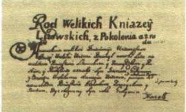 Беларуская (тарашкевіца): Хроніка Быхаўца, старонка рукапісу